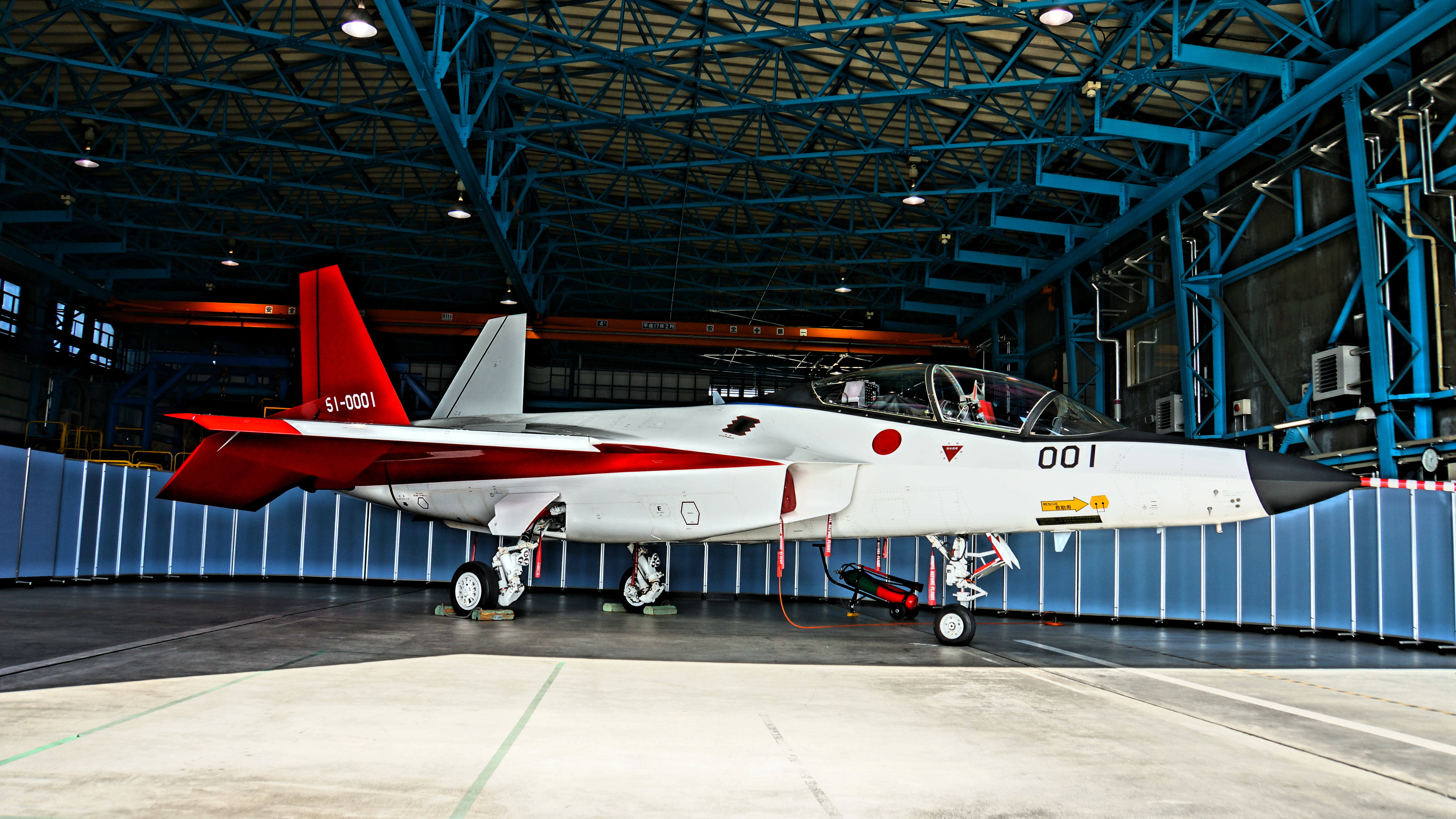 先進技術実証機 X-2 HDR撮影。2016年10月30日 航空自衛隊岐阜基地にて。